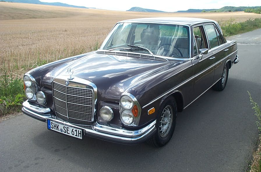 Mercedes-Benz 280 SE /9 3.5 Baujahr 04/1972 147 kW (200 PS), Benzin, Automatik, Klimaanlage, braun-metallic, 4/5 Türen